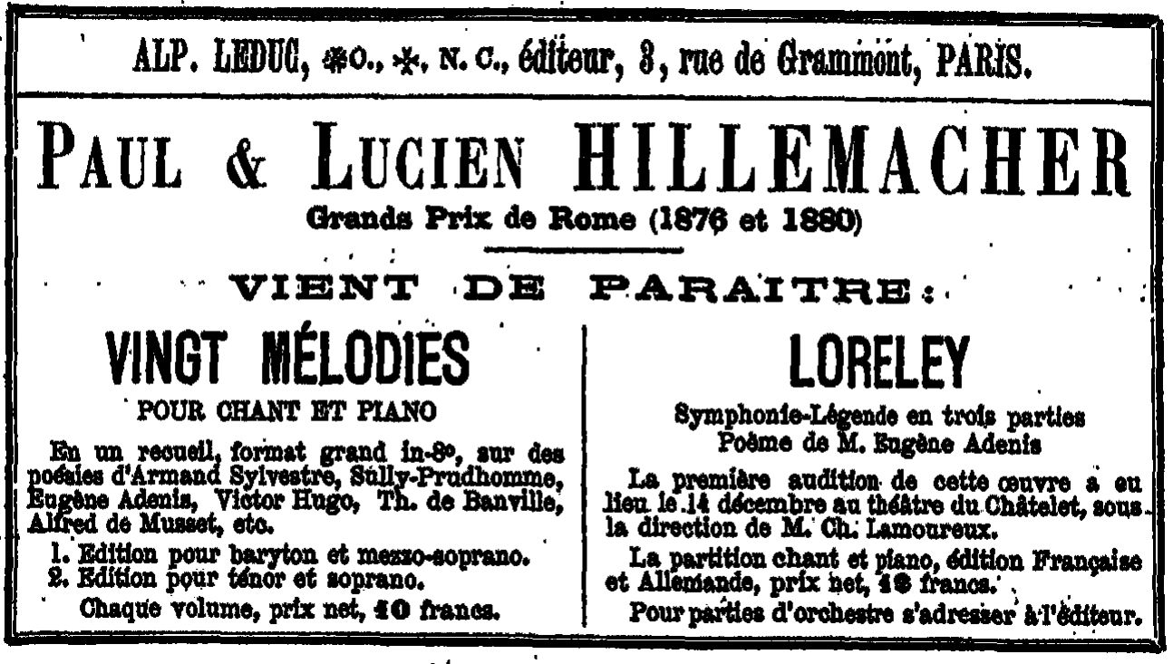 Encart publicitaire annonçant aux éditions Alphonse Leduc la parution de partitions de Paul et Lucien Hillemacher, extrait de "La Renaissance musicale" du 24 décembre 1882